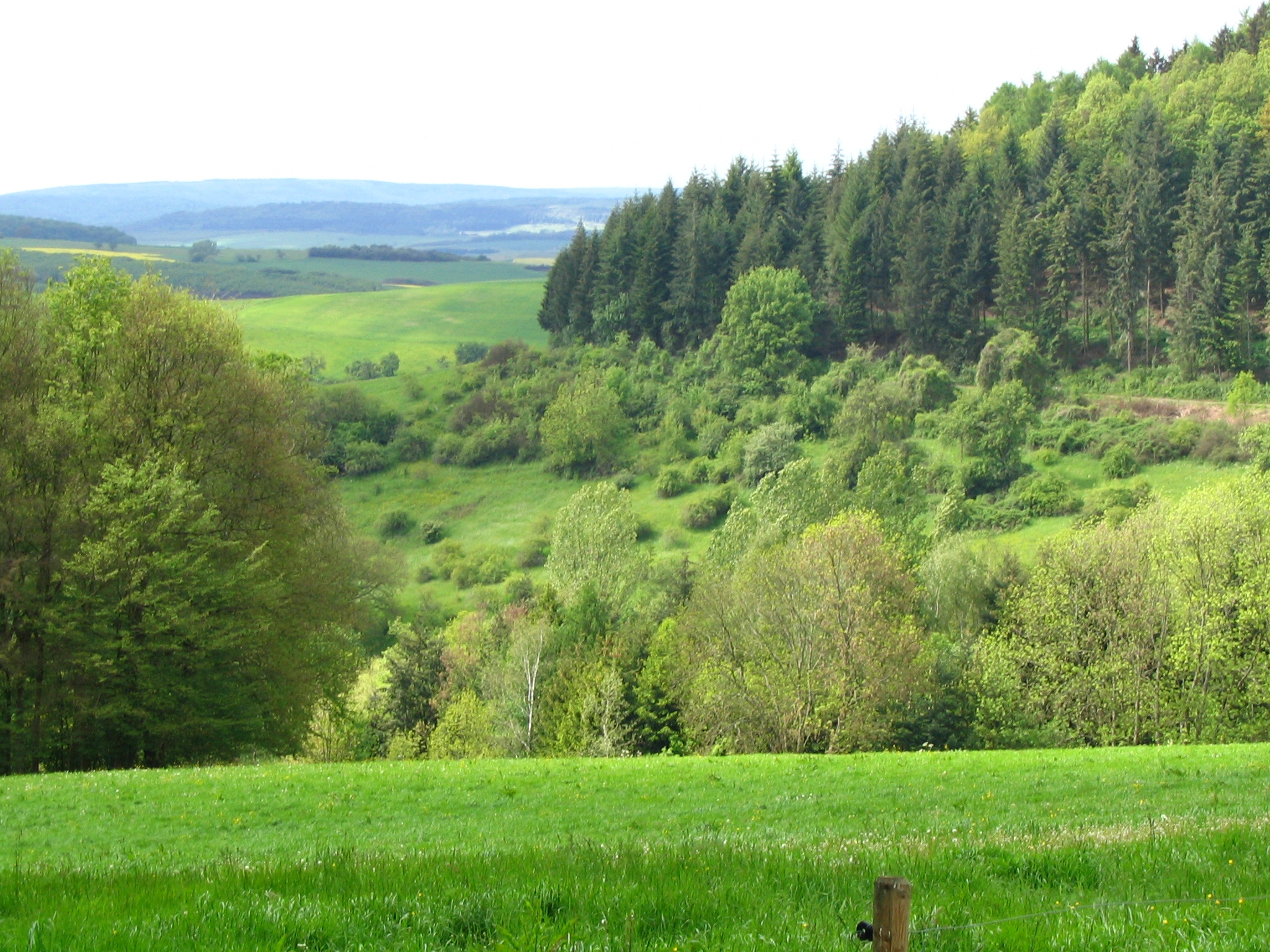 Der Westhang des Königsberges zwischen Essweiler und Oberweiler im Tal Urheber: Dieter hahn 12:55, 13. Jan. 2007 (CET)